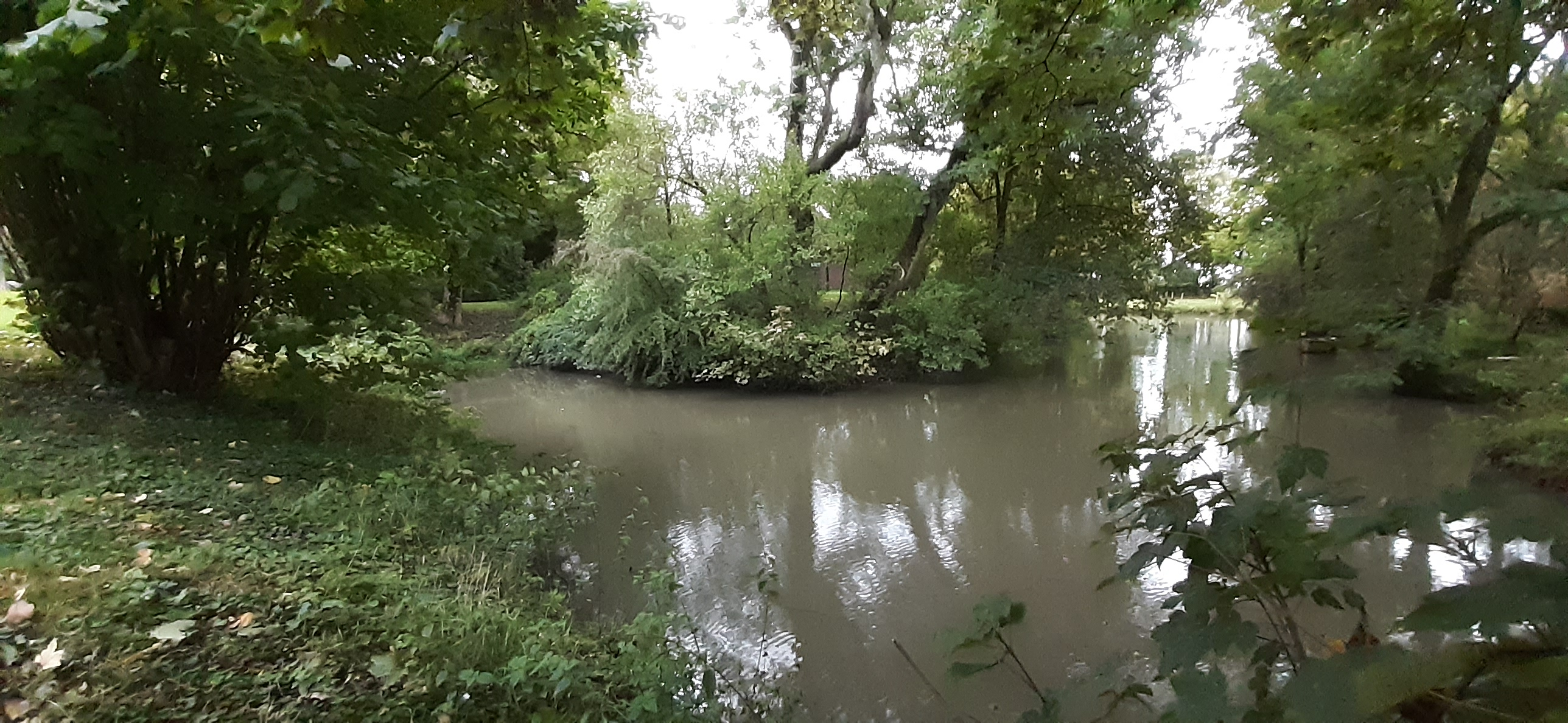 Blick auf den Burgstall Uttum von Westen; Bildseite links ist der unterbrochene Wassergraben, früher wohl eine Zugbrücke.